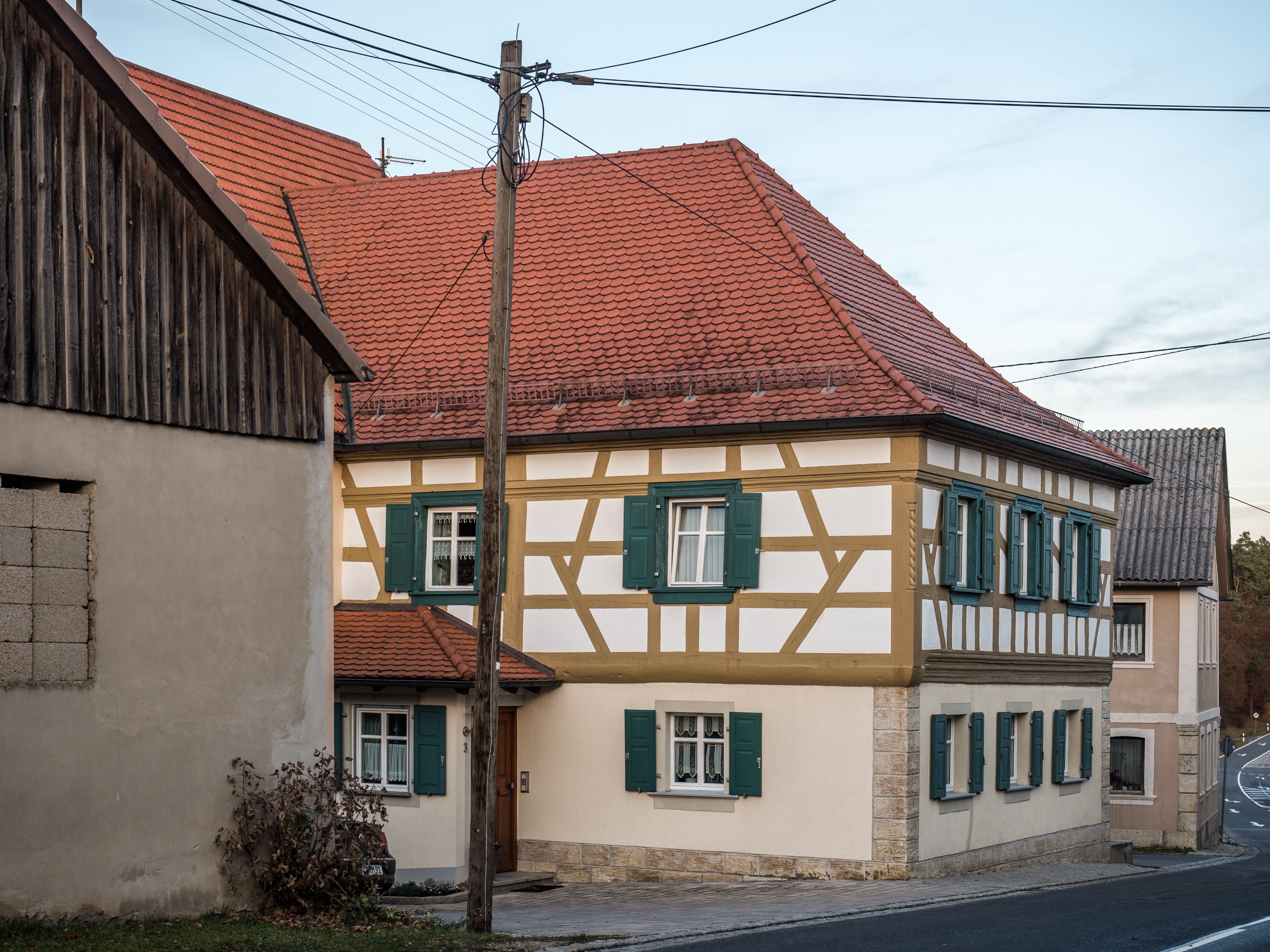 Bauernhaus in Roßdorf am Berg